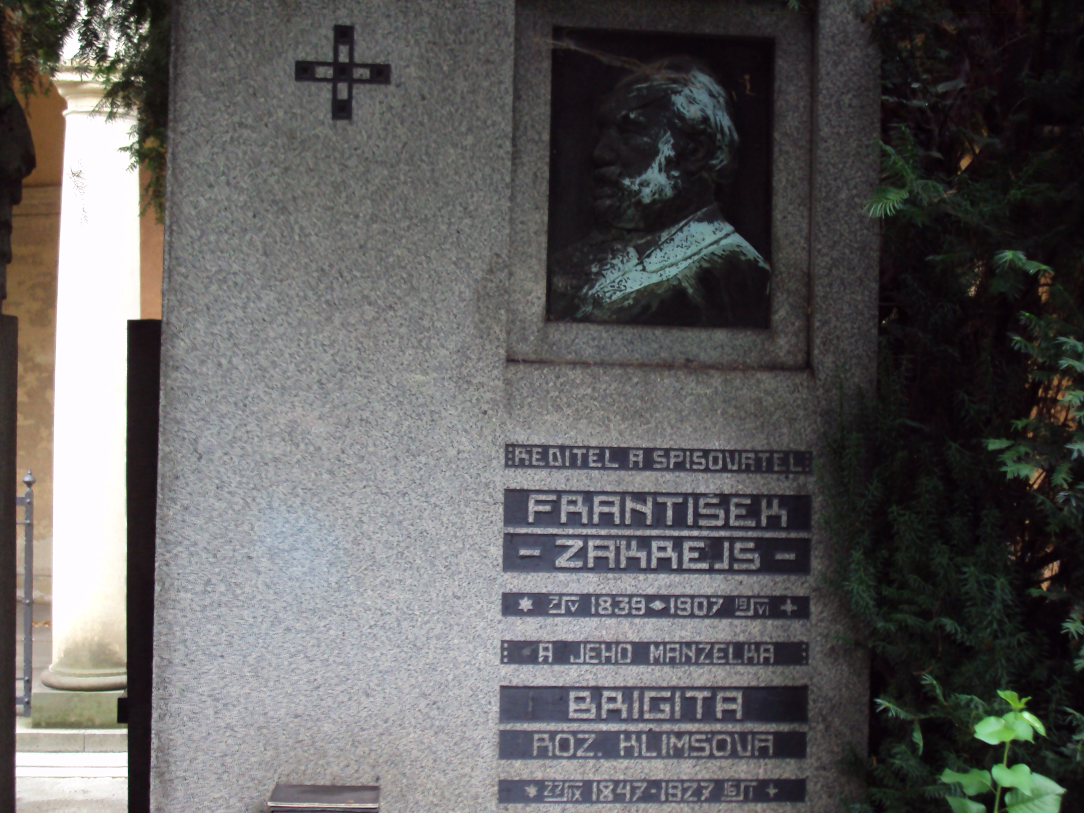 Hrob Františka Zákrejse na Vyšehradském hřbitově